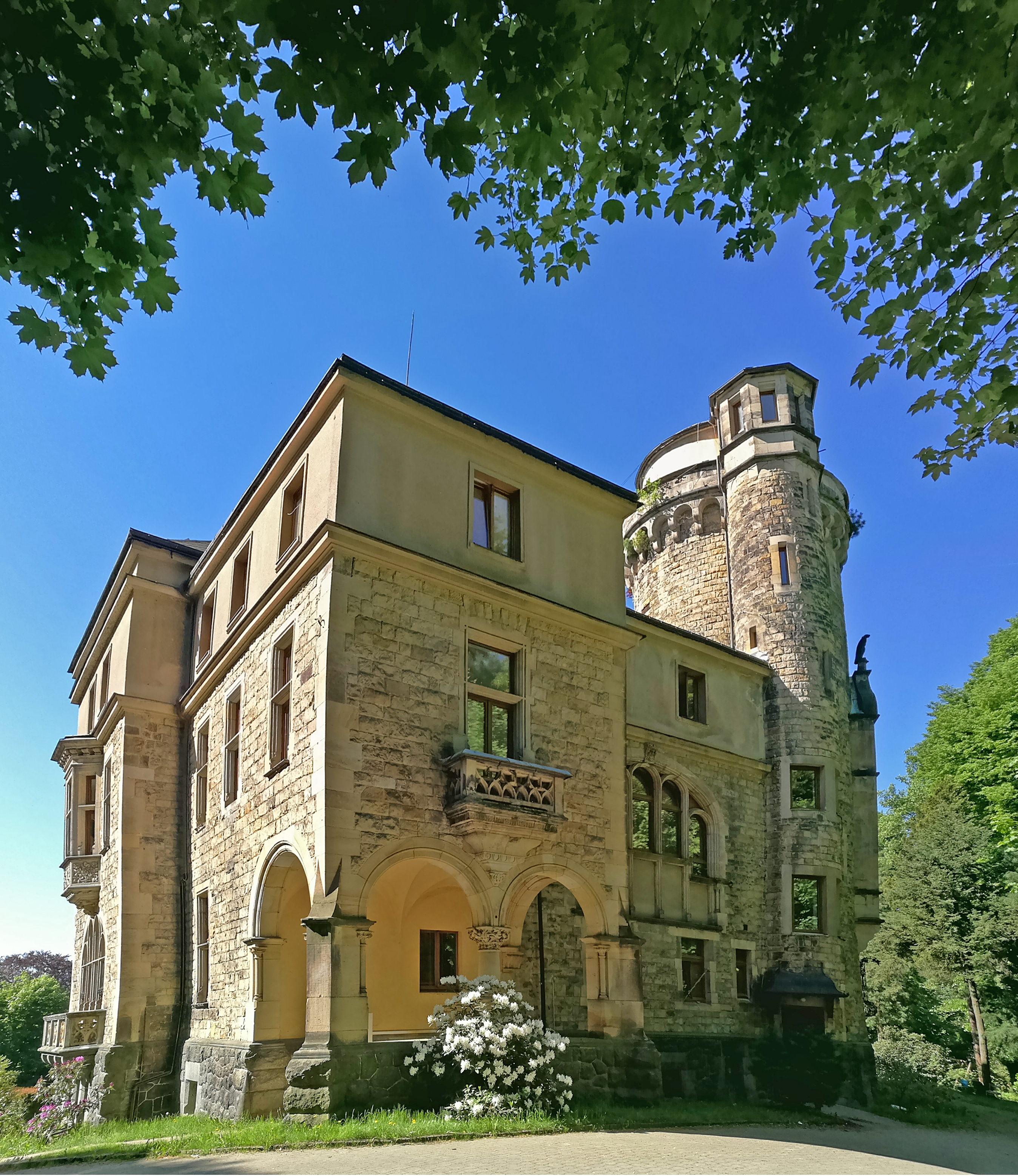 Zámek Vratislavice nad Nisou